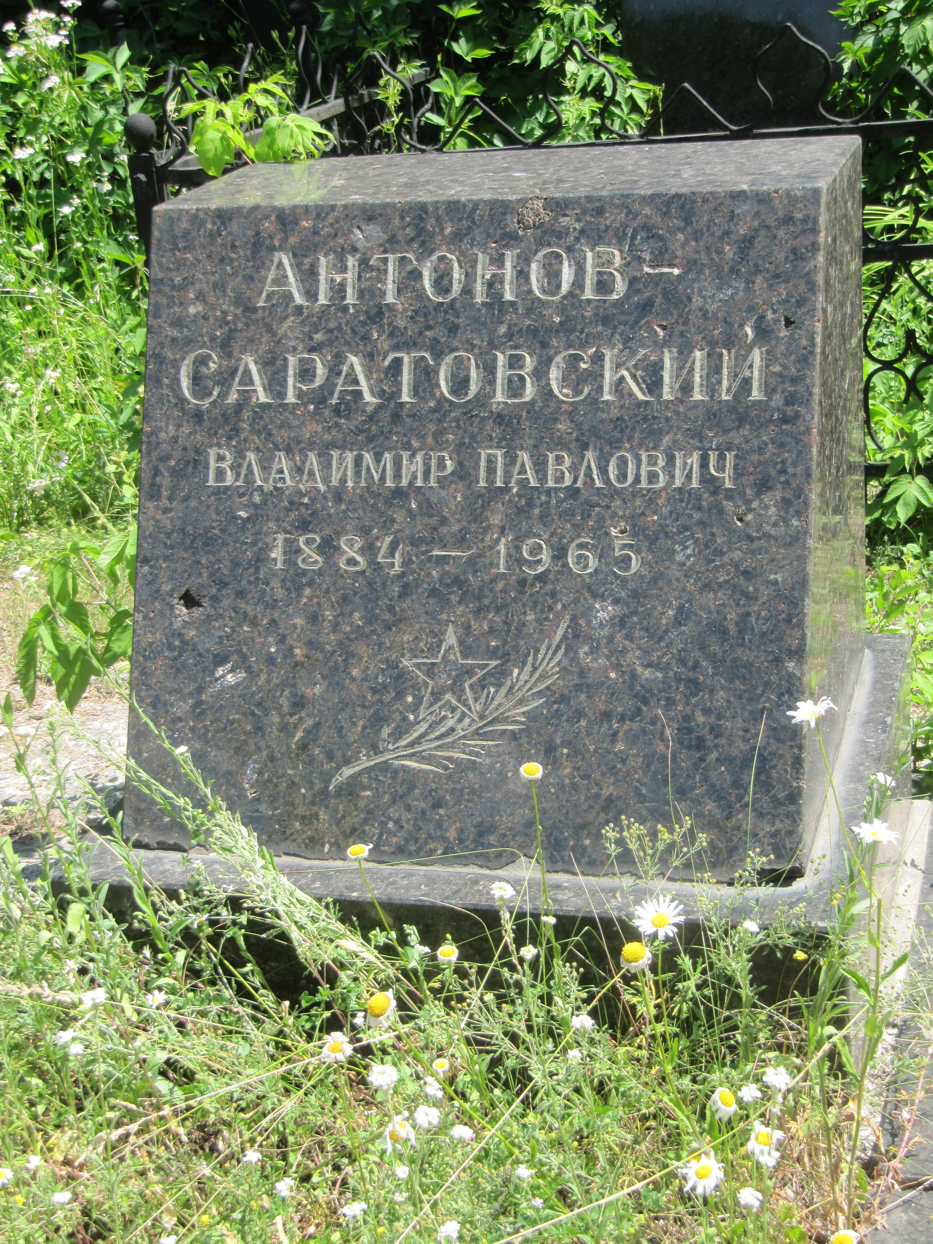 Могила Антонова-Саратовского Владимира Павловича (1884-1965), партийного и государственного деятеля: Воскресенское кладбище (рядом с могилой Чернышевского Н.Г.), Саратов, Саратовская область.